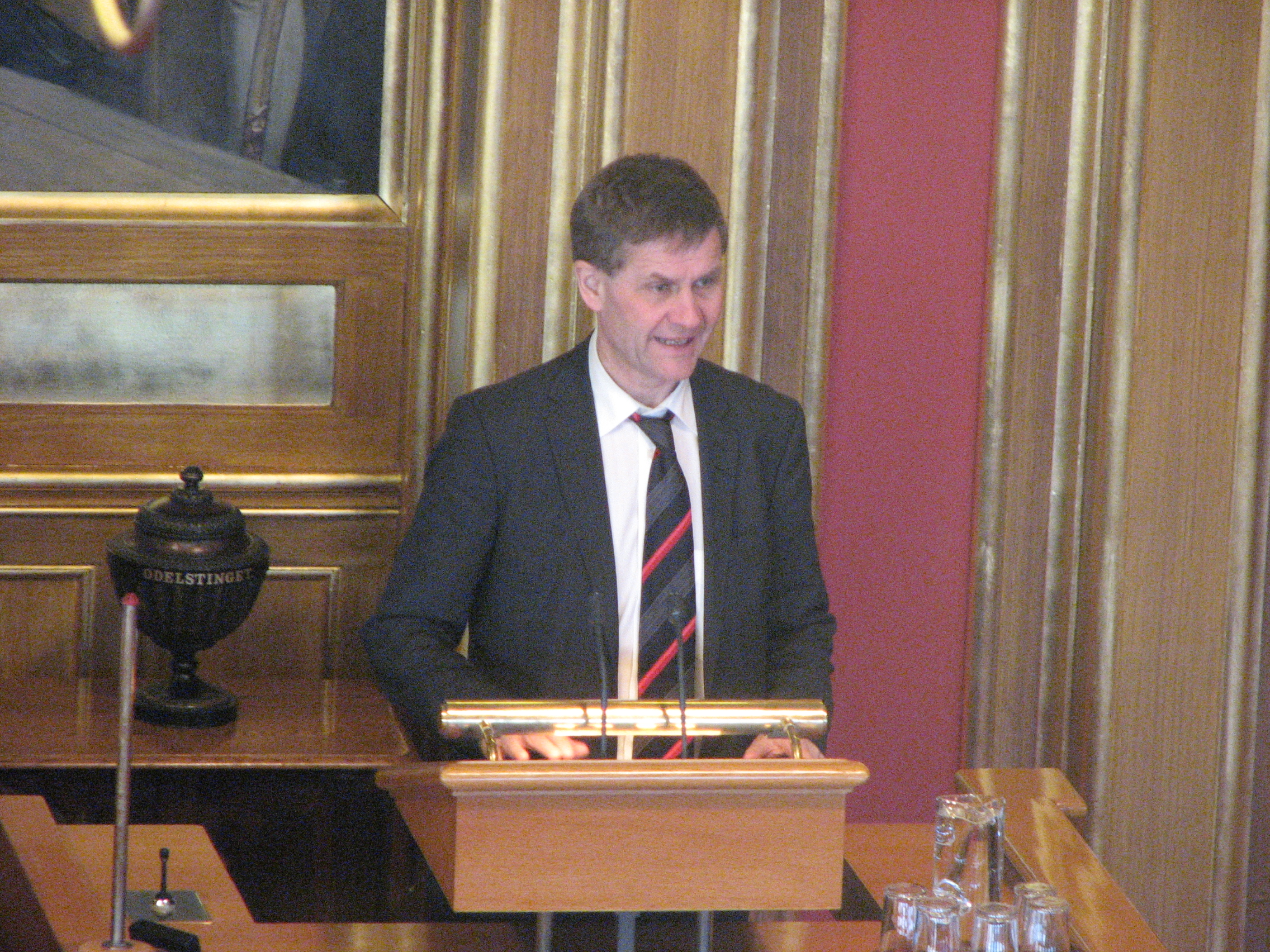 Statsråd Erik Solheim (SV) som deltar i debatten om Rammer for Fellesskapets vannpolitikk vanndirektivet i Stortinget 12. februar 2009.